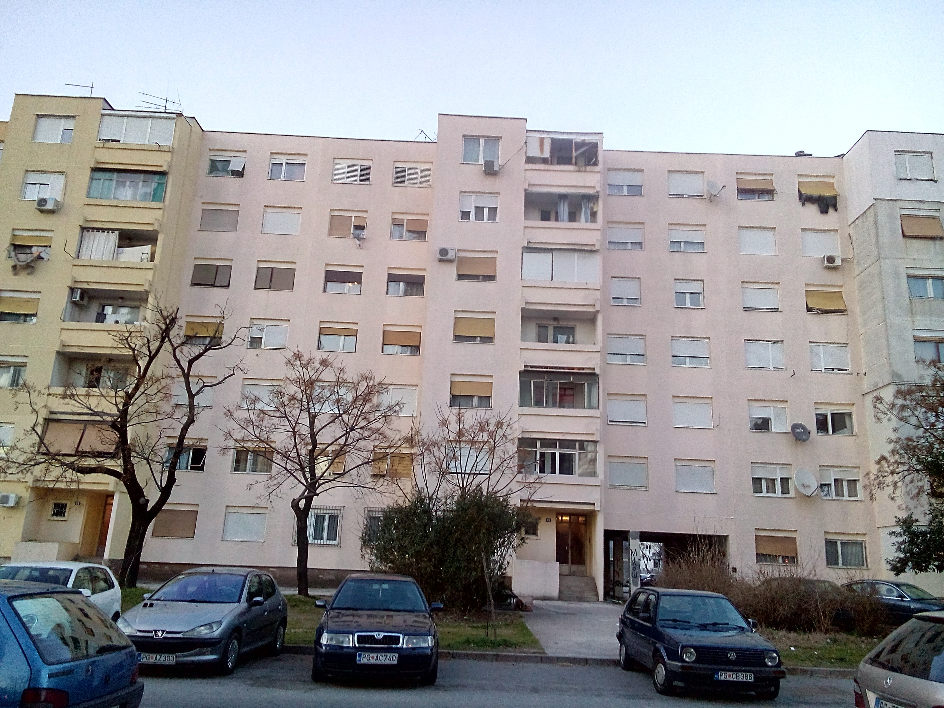 Черногория